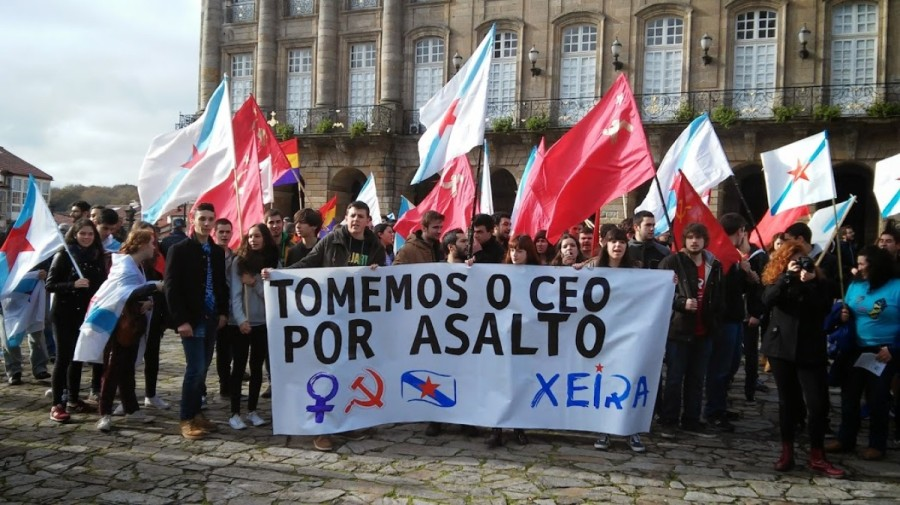 Membros de Xeira. 29N Marcha da Dignidade. Santiago de Compostela 2014.